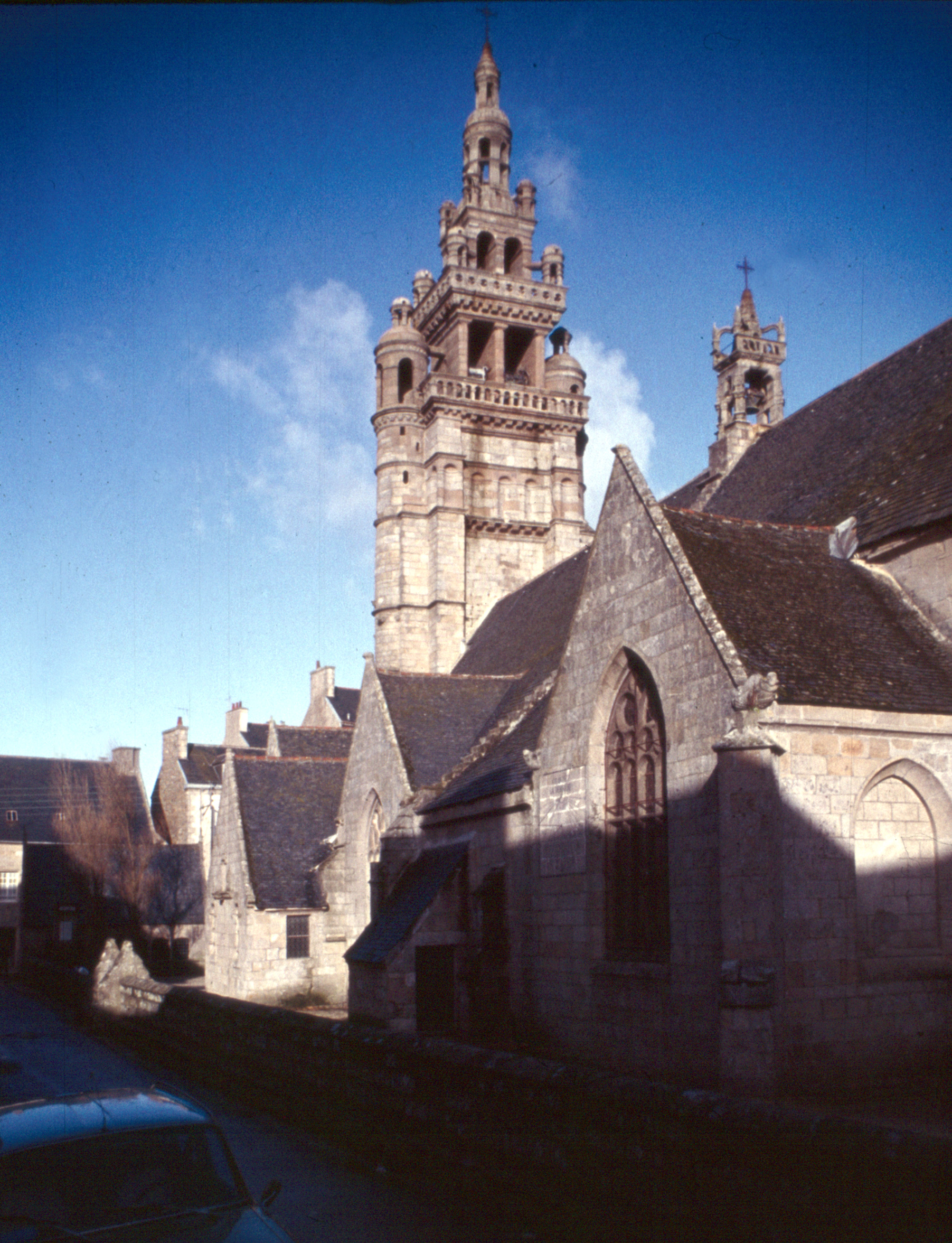 Roscoff, Notre-Dame de Croaz Batz 1978